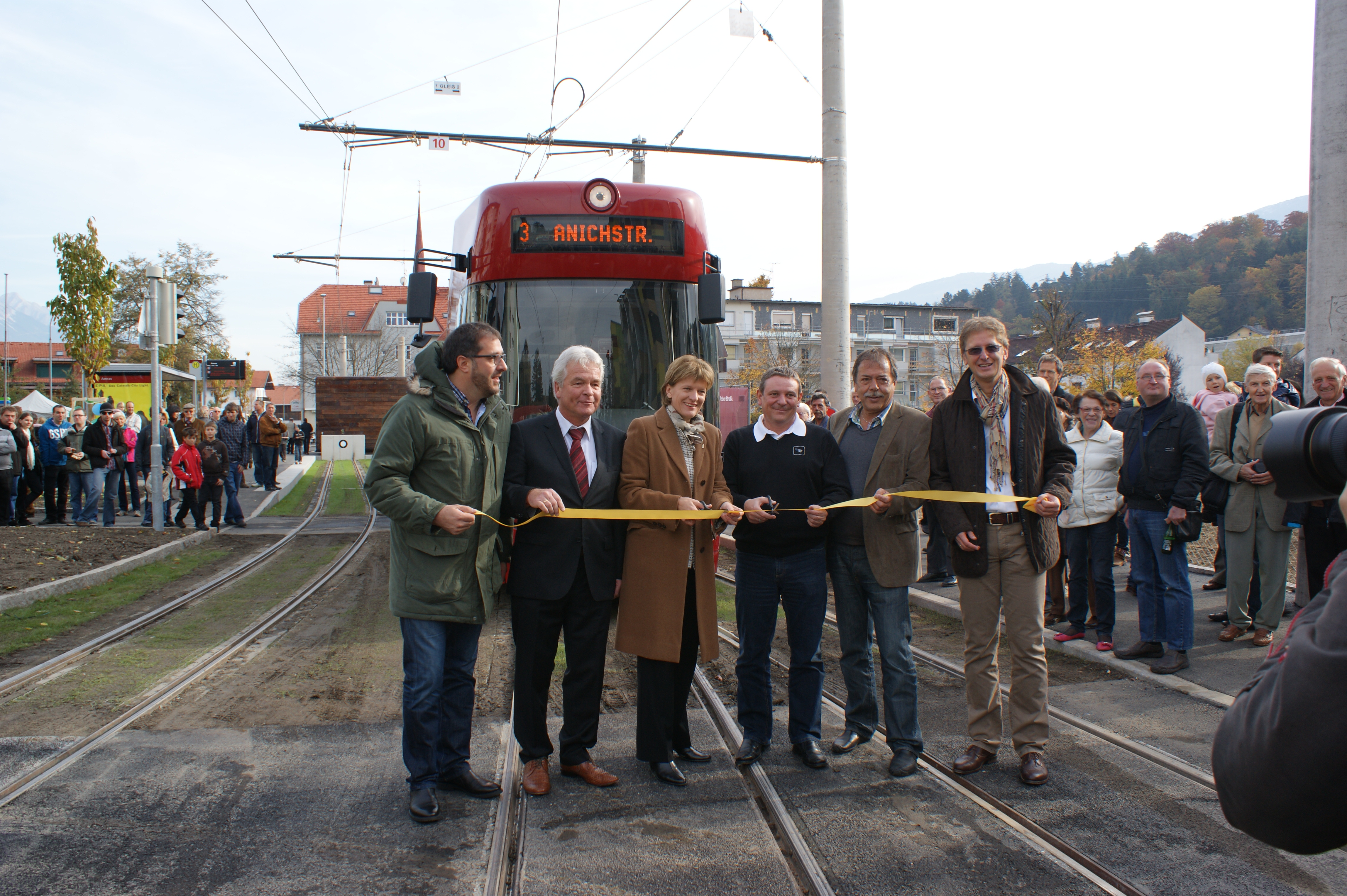 Eröffnung der Verlängerung in Amras der Linie 3 der Straßenbahn Innsbruck.